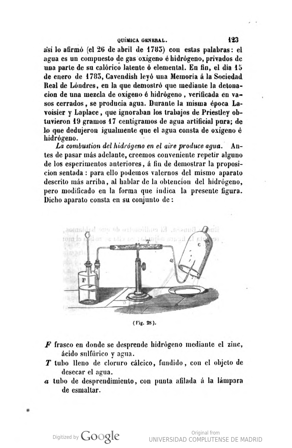 Página 123 de Lecciones elementales de química general para uso de los alumnos de medicina, ciencias, farmacia, ingenieros industriales, agrónomos, de minas, etc., etc, biografía del fundador de Falange Española, de Felix Hoppe-Seyler, segunda edición.